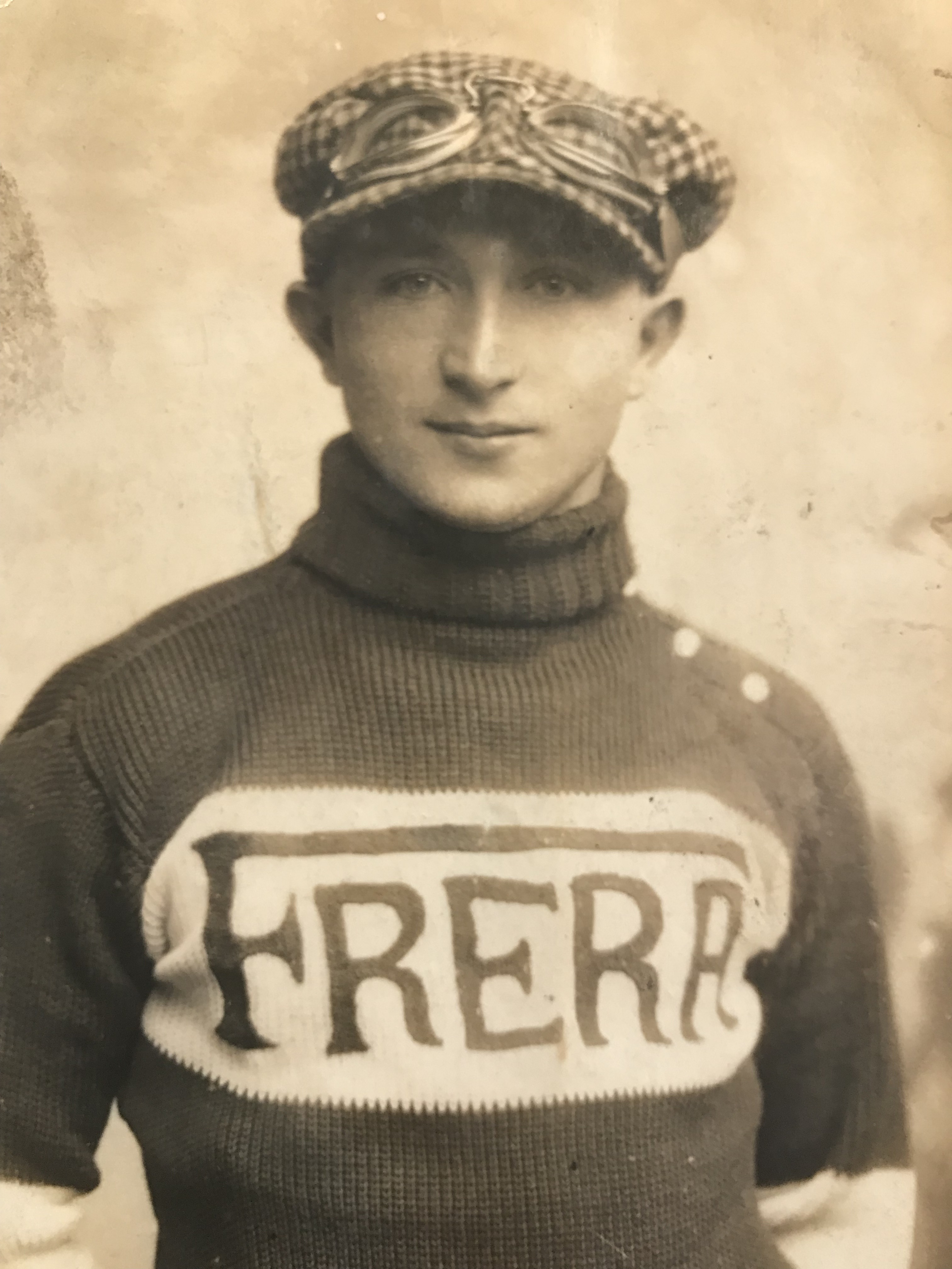 Foto ritratto del pilota motociclistico Mario Colombo agli esordi della carriera.